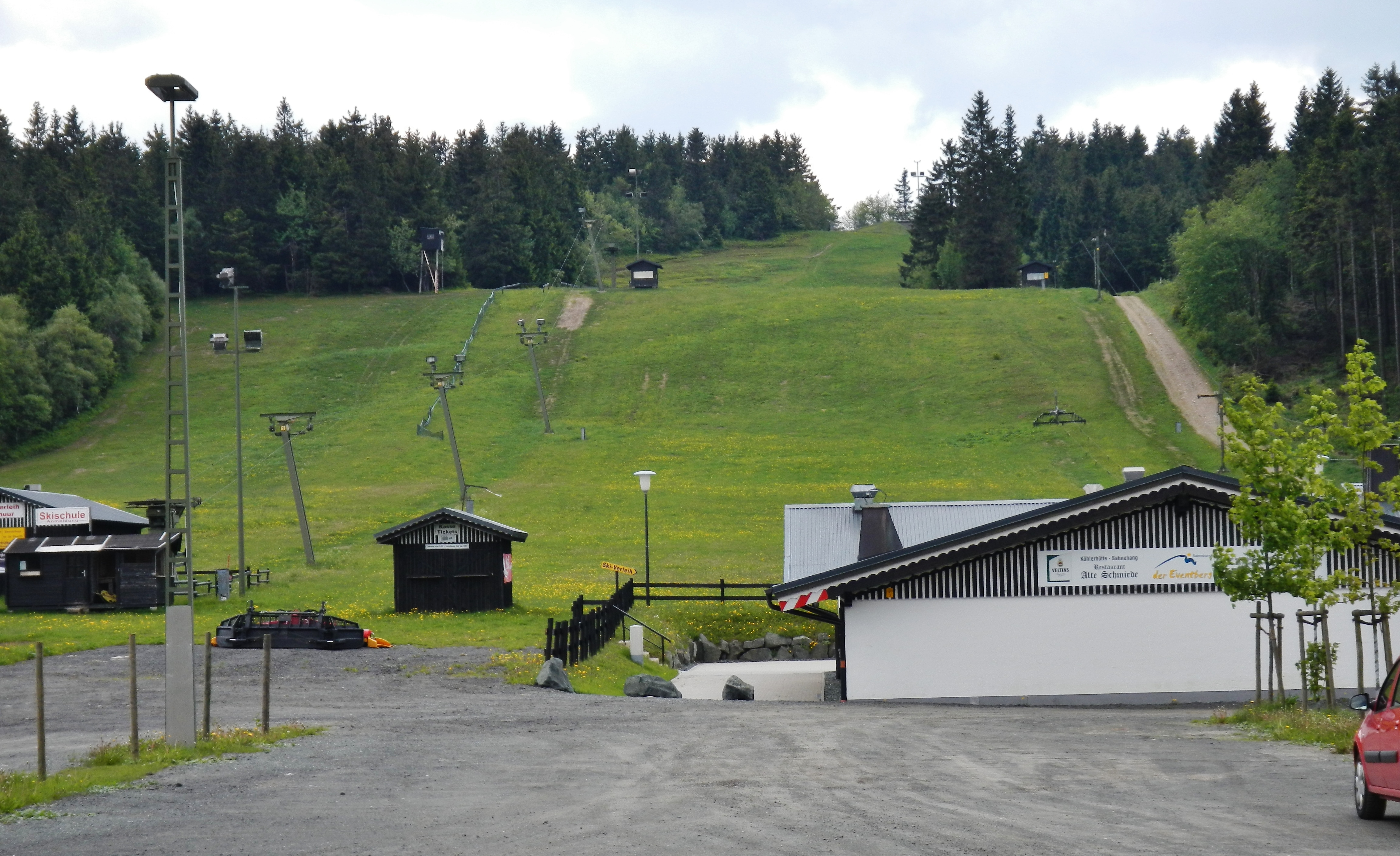 Skigebiet Sahnehang gleichzeitig Landschaftsschutzgebiet Skigebiet Kahler Asten; Wald gehört zum LSG Winterberg